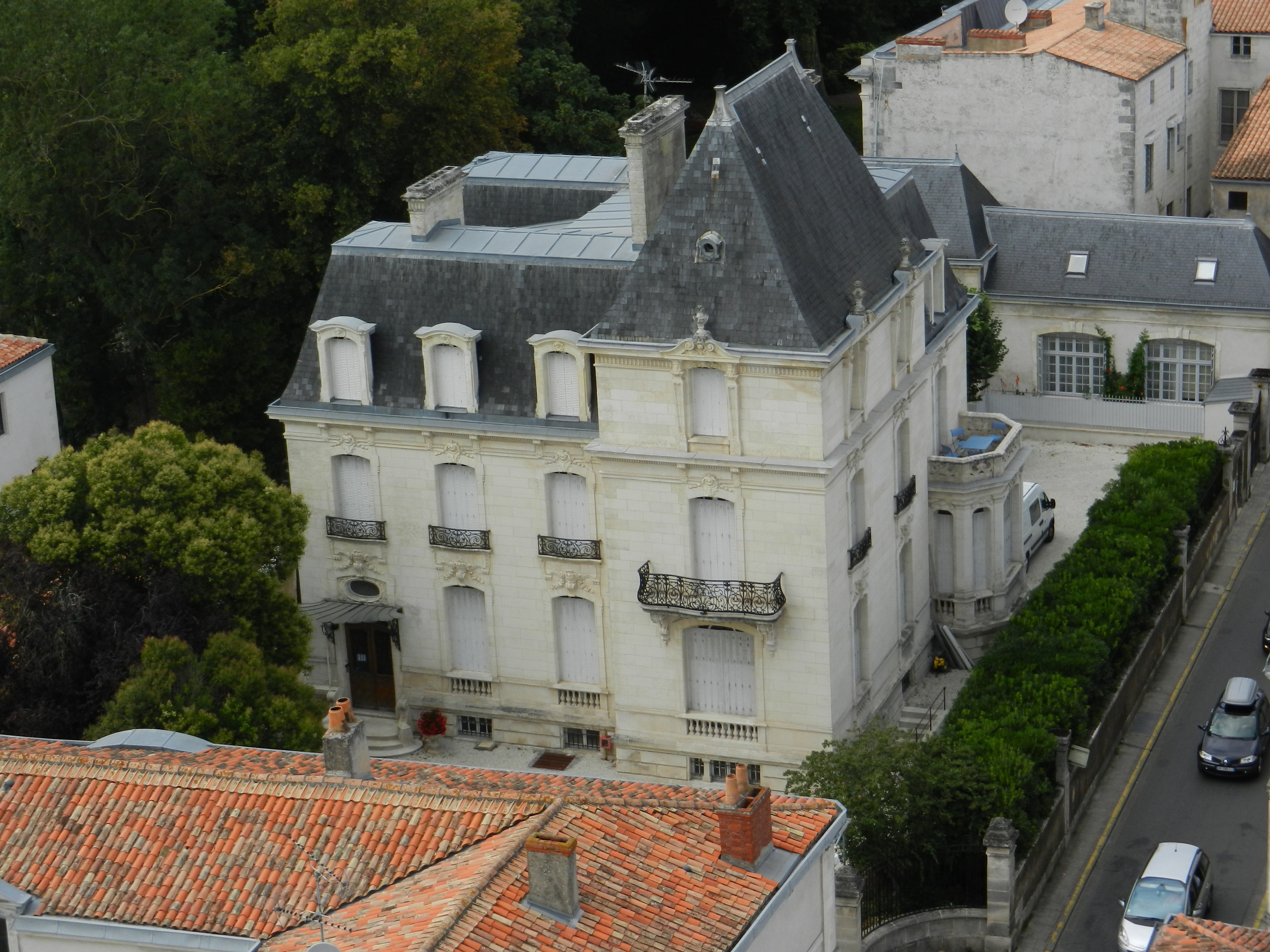 Actuellement annexe de la Préfecture de Charente-Maritime. Ancien Siège du Conseil Général de Charente-Maritime. Ancienne maison de la famille Vieljeux. Située au 3 rue de la monnaie à La Rochelle Photo prise depuis le sommet de la Tour de la Lanterne.